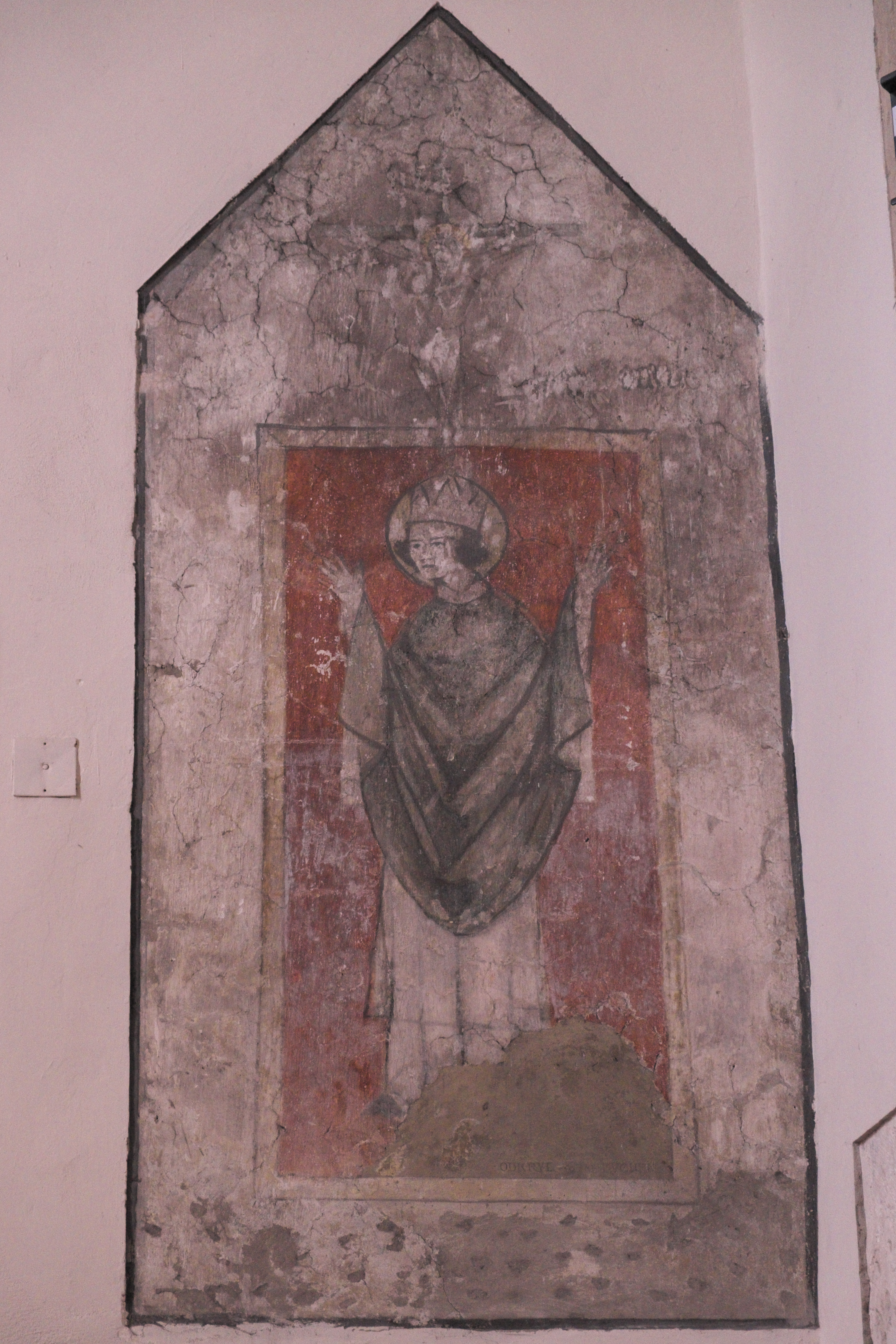 Katholische Pfarrkirche St. Georg in Svätý Jur (Slowakei)